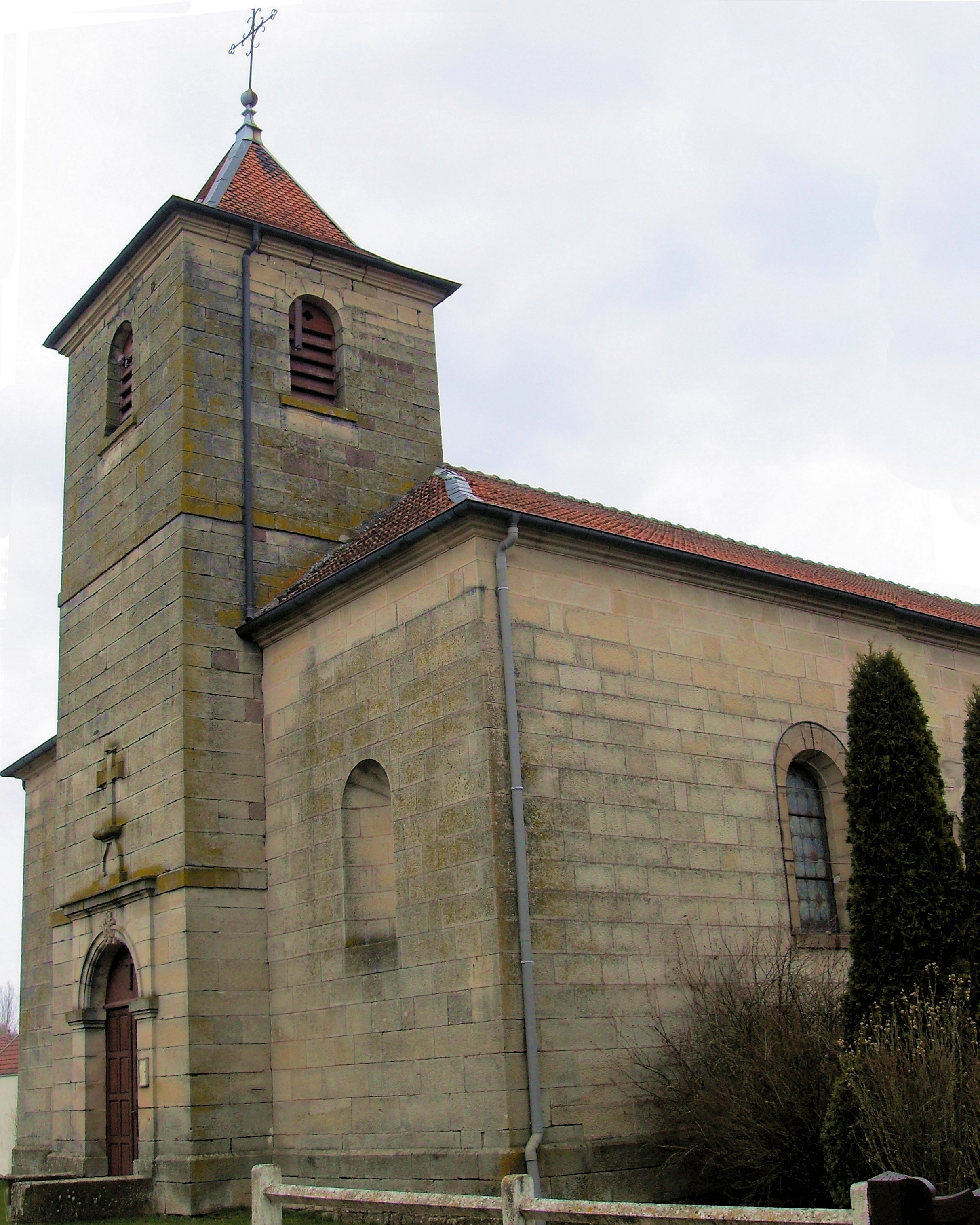 L'église Saint-Étienne à Dampvalley-Saint-Pancras